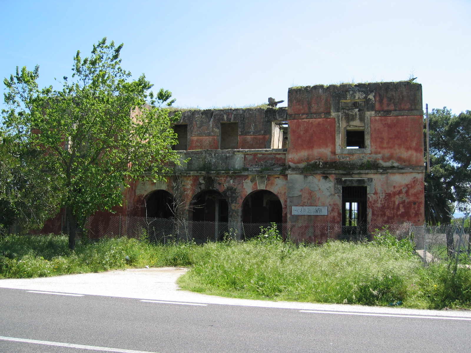 Foto scattata il 25.4.2008